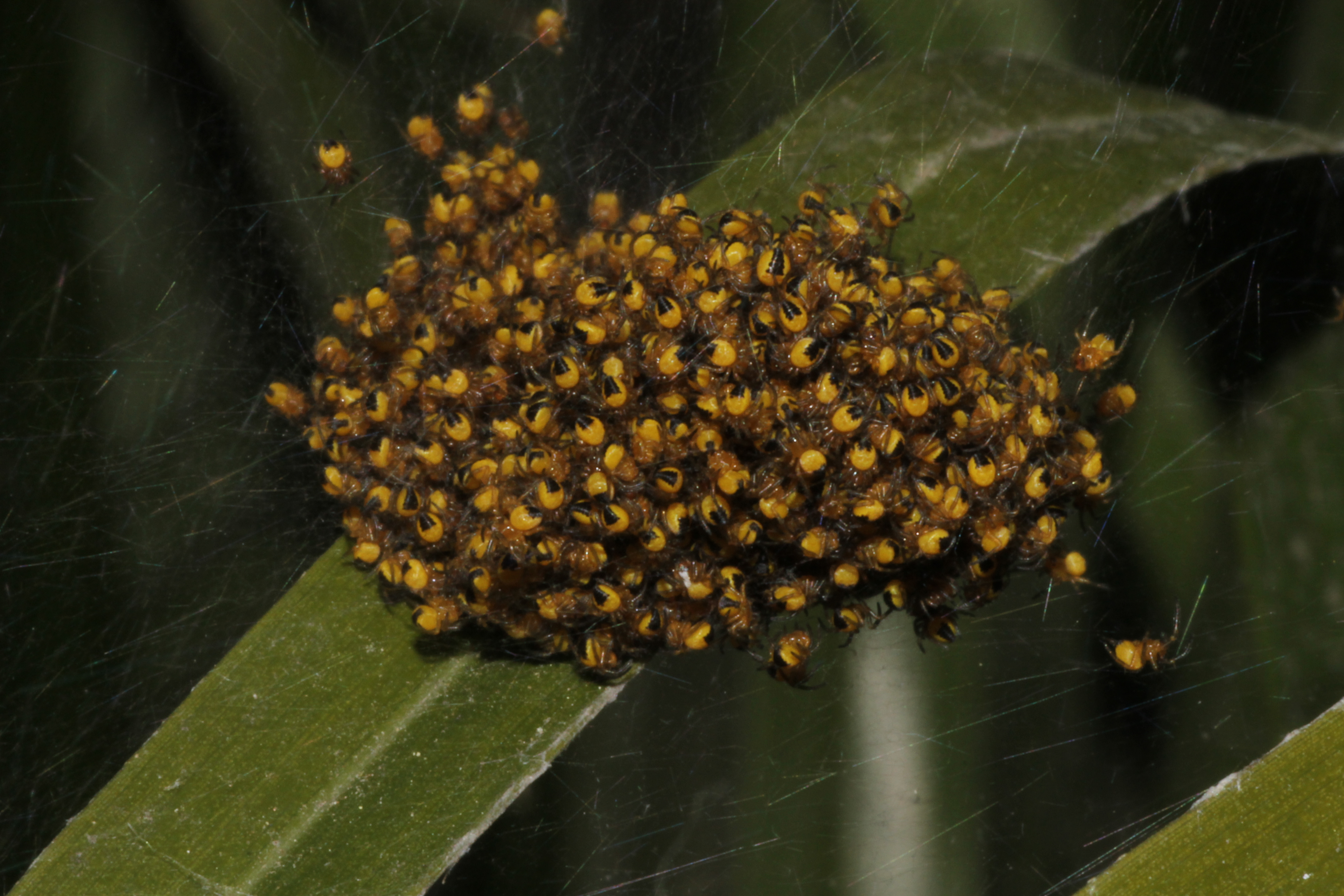 Individui giovani di Argiope Bruennichi